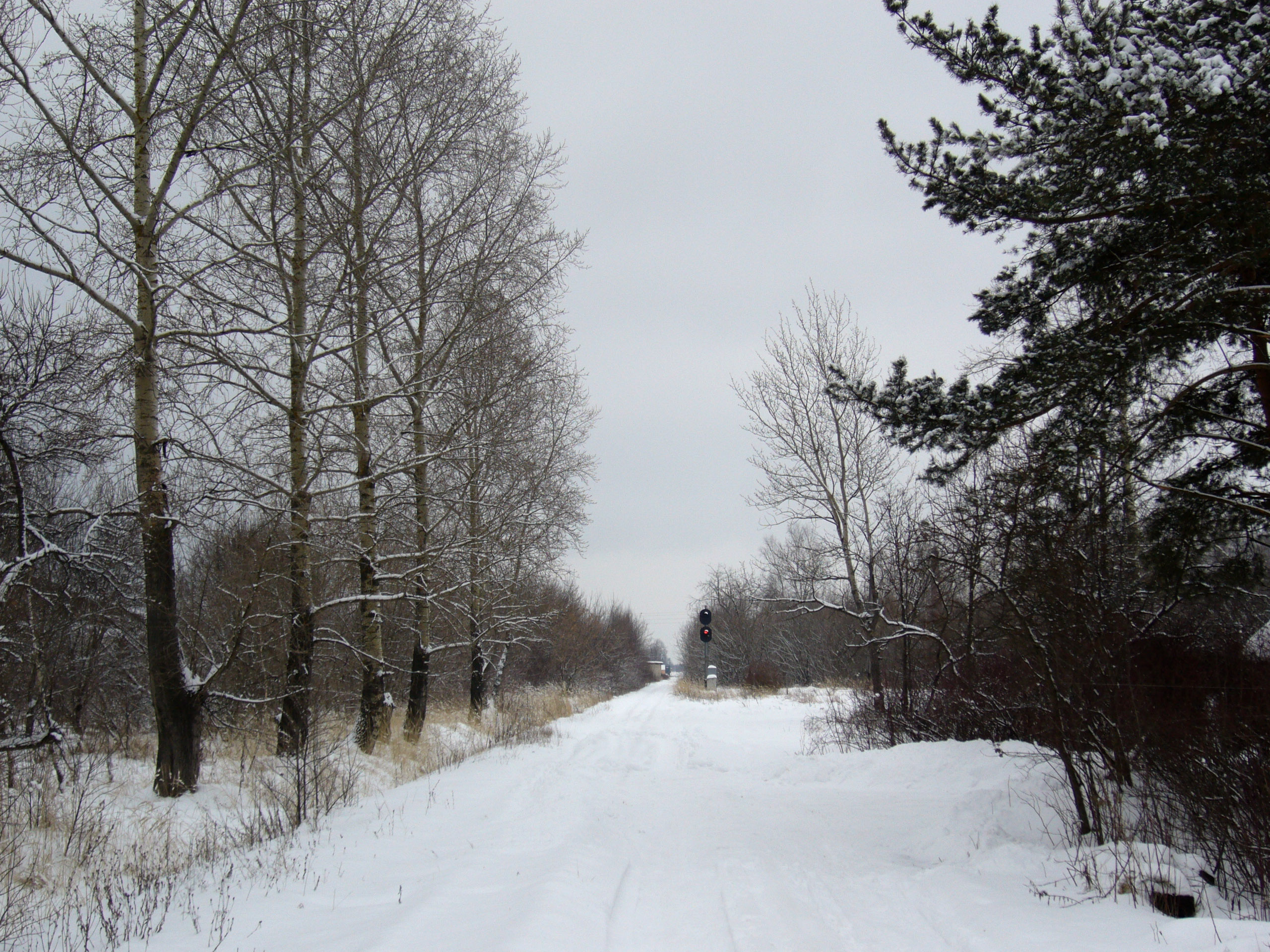 Светофорная сигнализация на участке Тумская - Гуреевский. Фото в направлении на Тумскую. Путь не разобран, но занесен снегом.